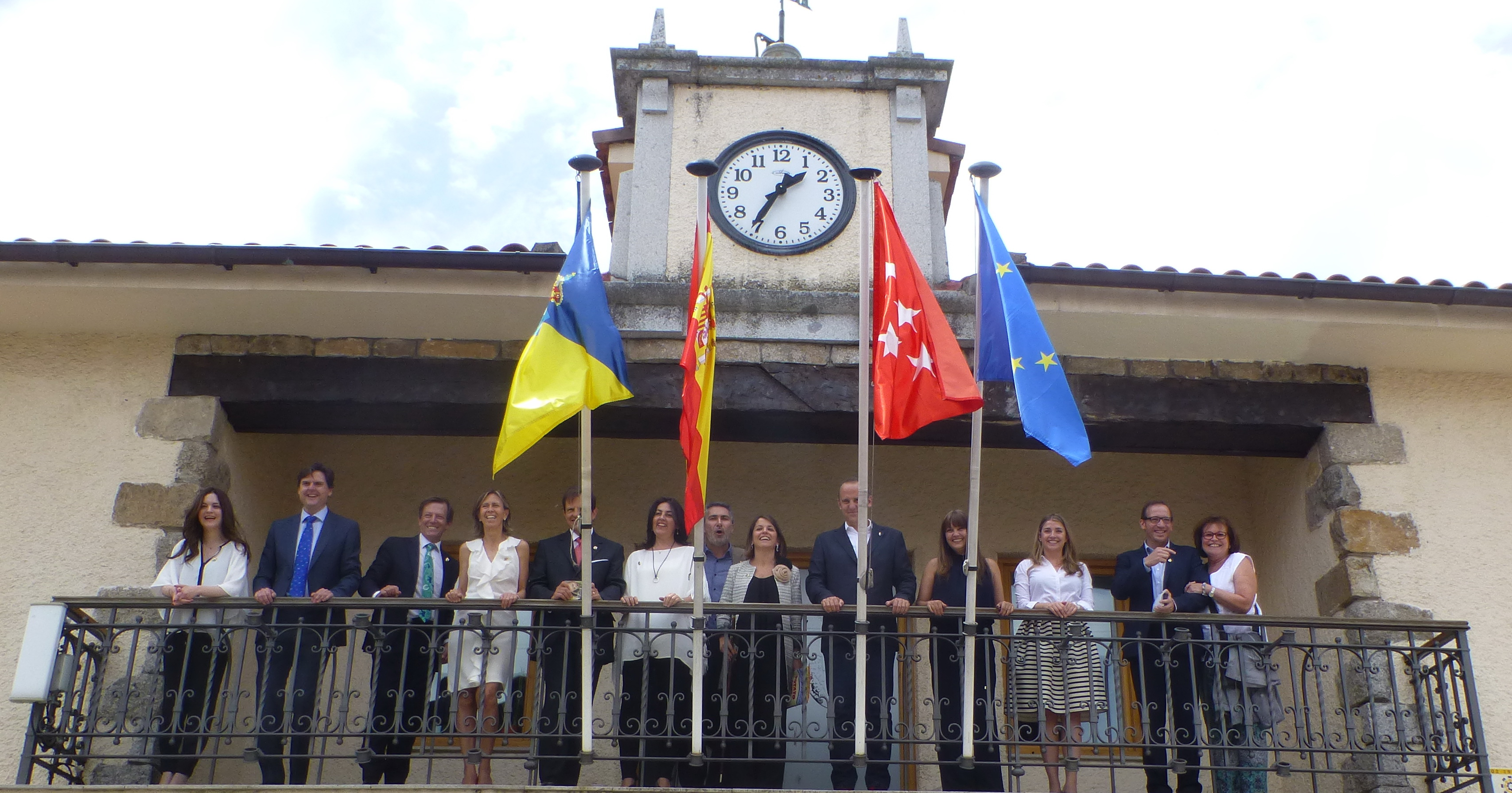 Torrelodones. Doce concejales de Vecinos por Torrelodones en el balcón de la Alcadía el día de investidura (13-06-2015)